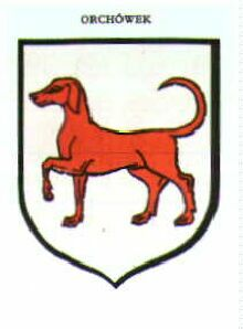 Herb Orchówka (woj. lubelskie)